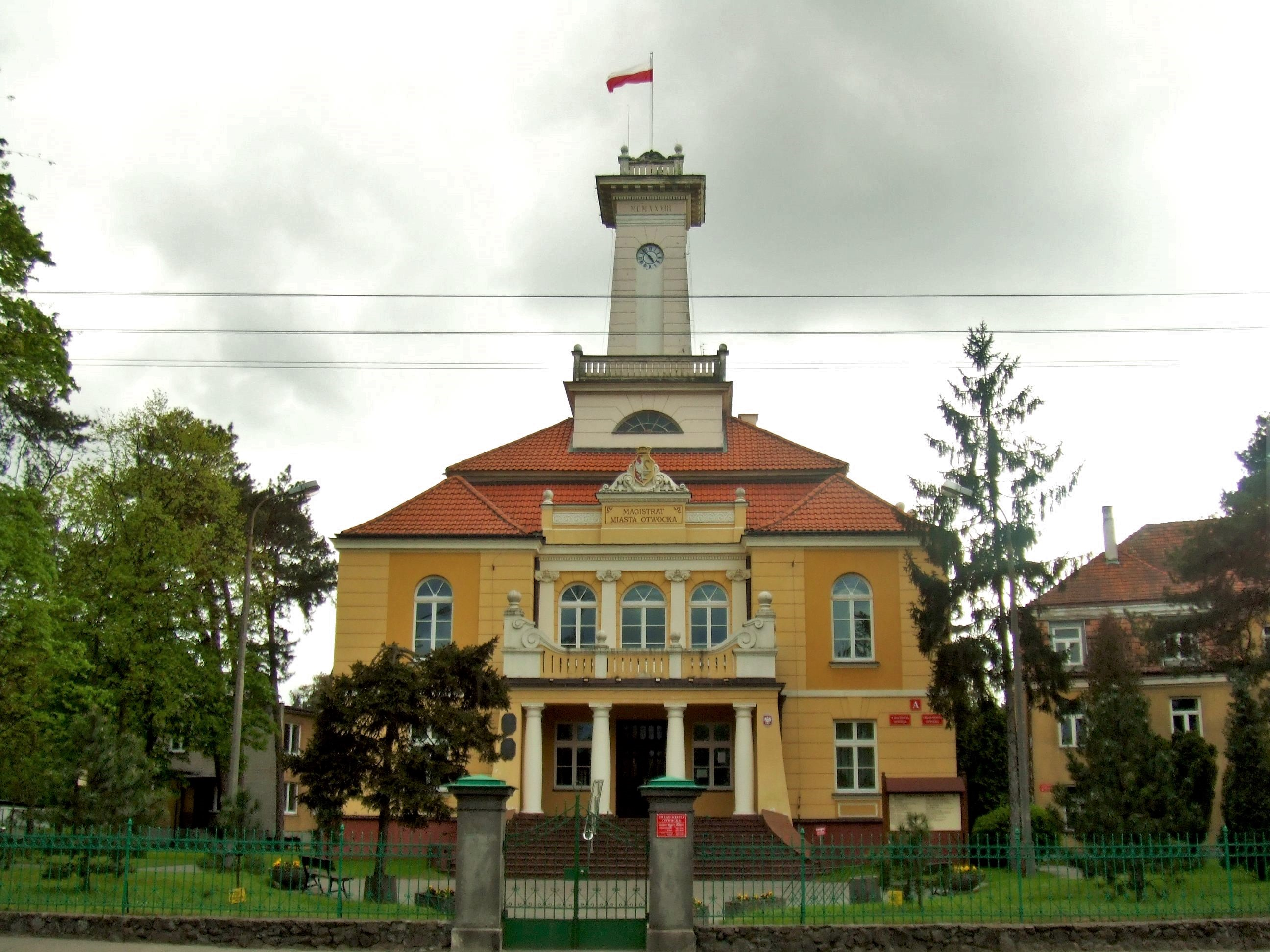 Otwock, ul. Armii Krajowej 5 - ratusz i budynek administracyjny (zabytek 936-A z 31.01.1979)